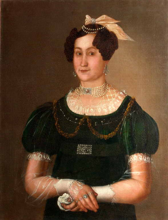 Портрет Евдокии Дмитриевны Суриной. 1829 г. Холст, масло (Угличский музей) 79х64,5 Уг.-2161